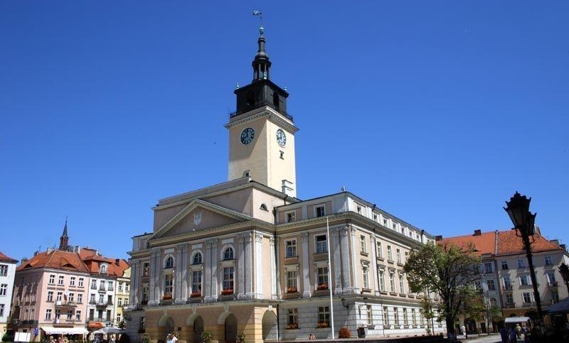 Polska